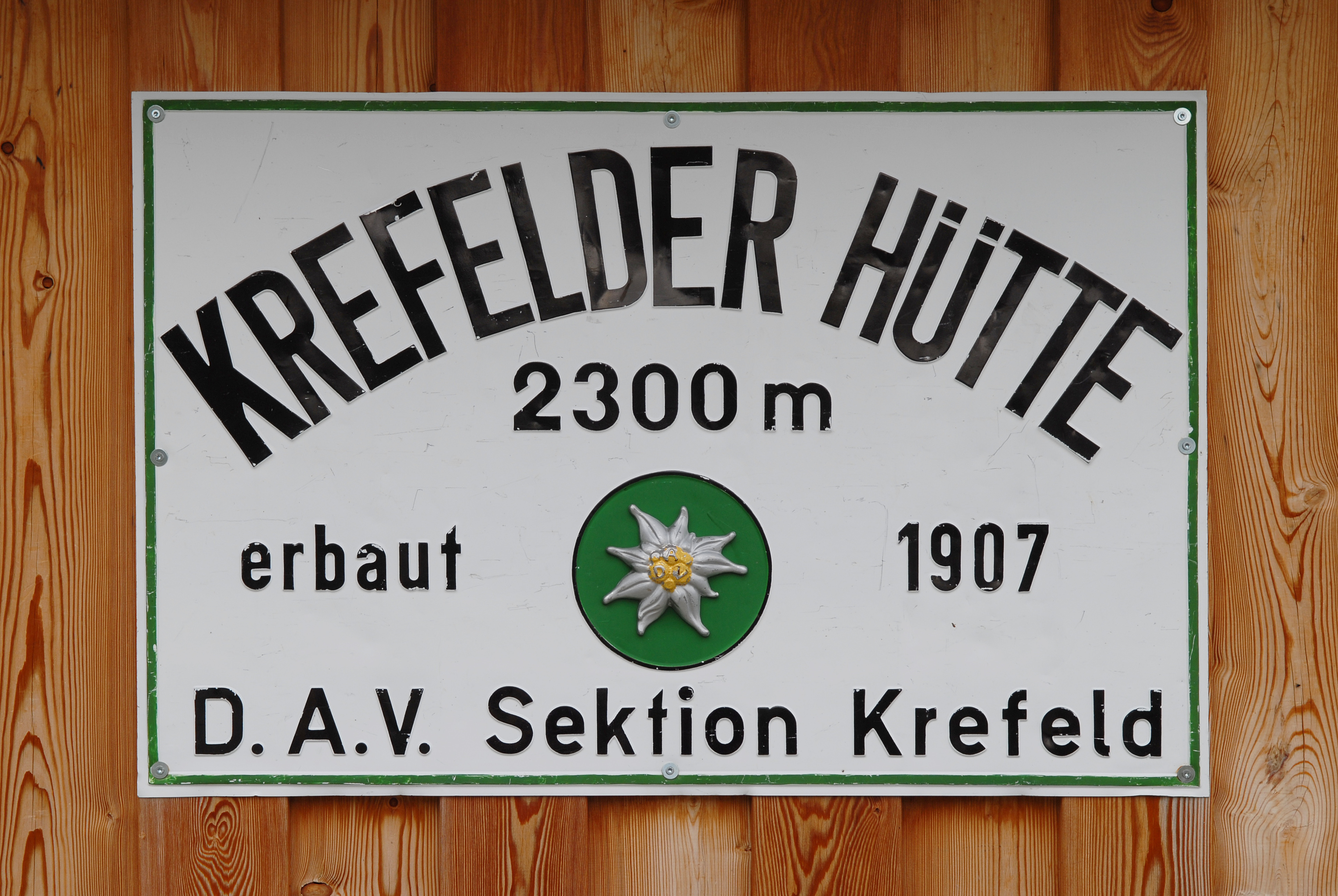 Schild der Krefelder Hütte am 24. Juli 2014